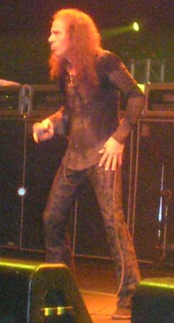 Eu asseguro ser o criador desta contribuição e/ou que a mesma não viola nenhum direito de terceiros. Eu concordo em publicar este texto sob a GNU Free Documentation License.